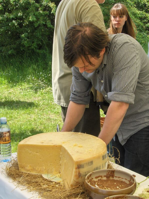 Rene Redzepi og en ost